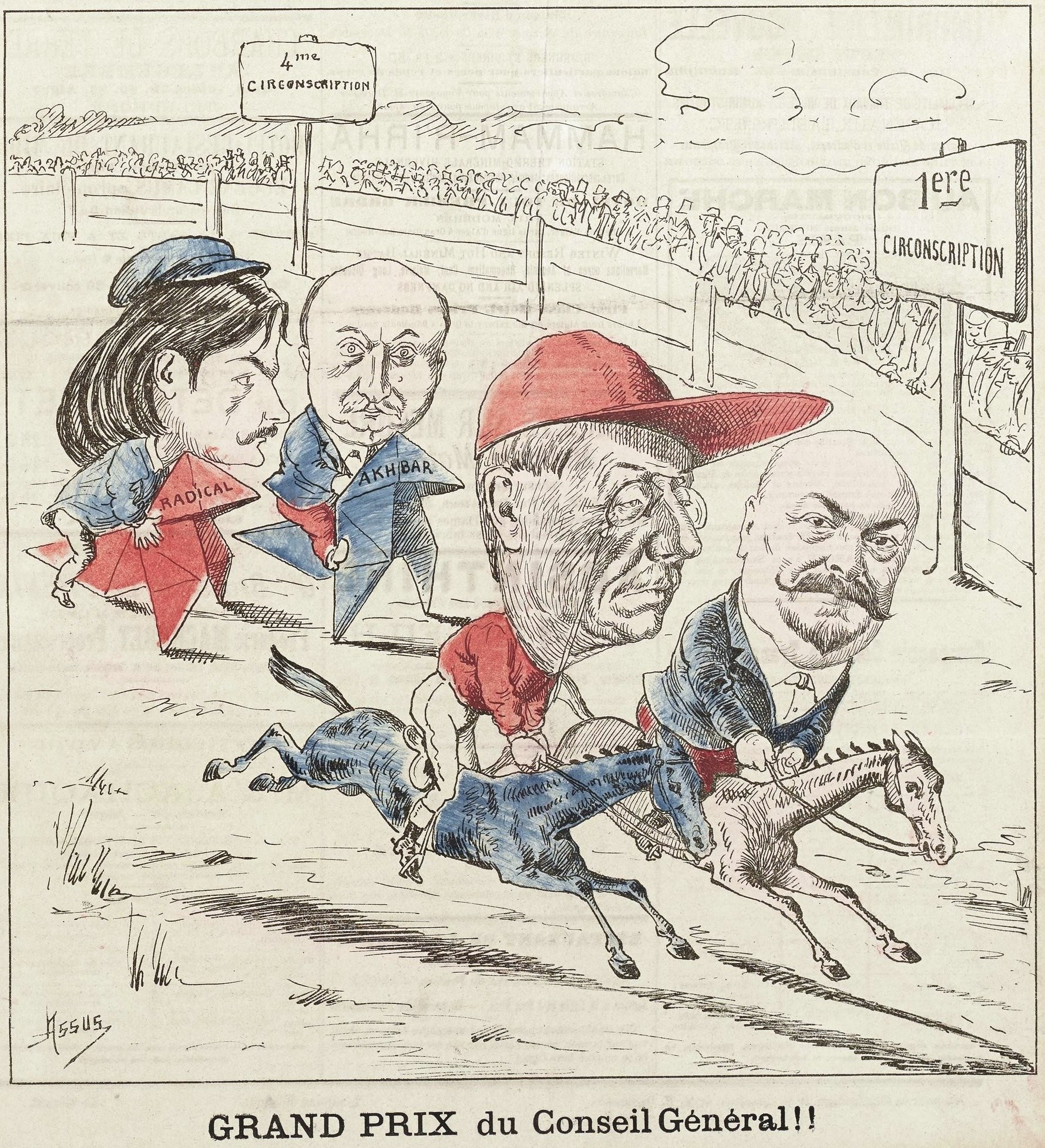 Caricature à propos des élections cantonales de décembre 1893 dans la 1ère et la 4e circonscription d'Alger. Les élus seront Serpaggi (4e) et Mertz (1ère).